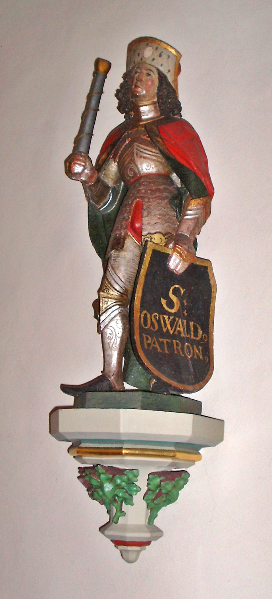 St. Oswald of Northumbria, gotische Figur in der Pfarrkirche St. Oswald, Boßweiler, Rheinland-Pfalz